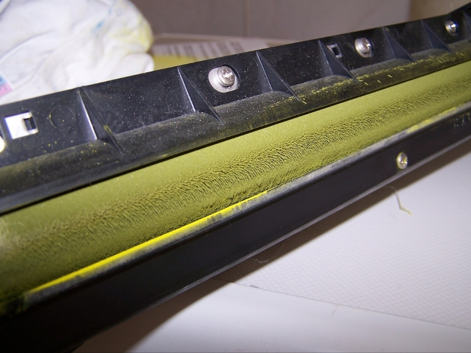 Entwicklereinheit Gelb eines Vollfarbsystems Sie dreht sich im laufenden Betrieb erheblich schneller als die Bildtrommel und die Fliehkraft sorgt dafür, das sich die losen, aus Eisenspänen bestehenden Borsten, aufstellen.